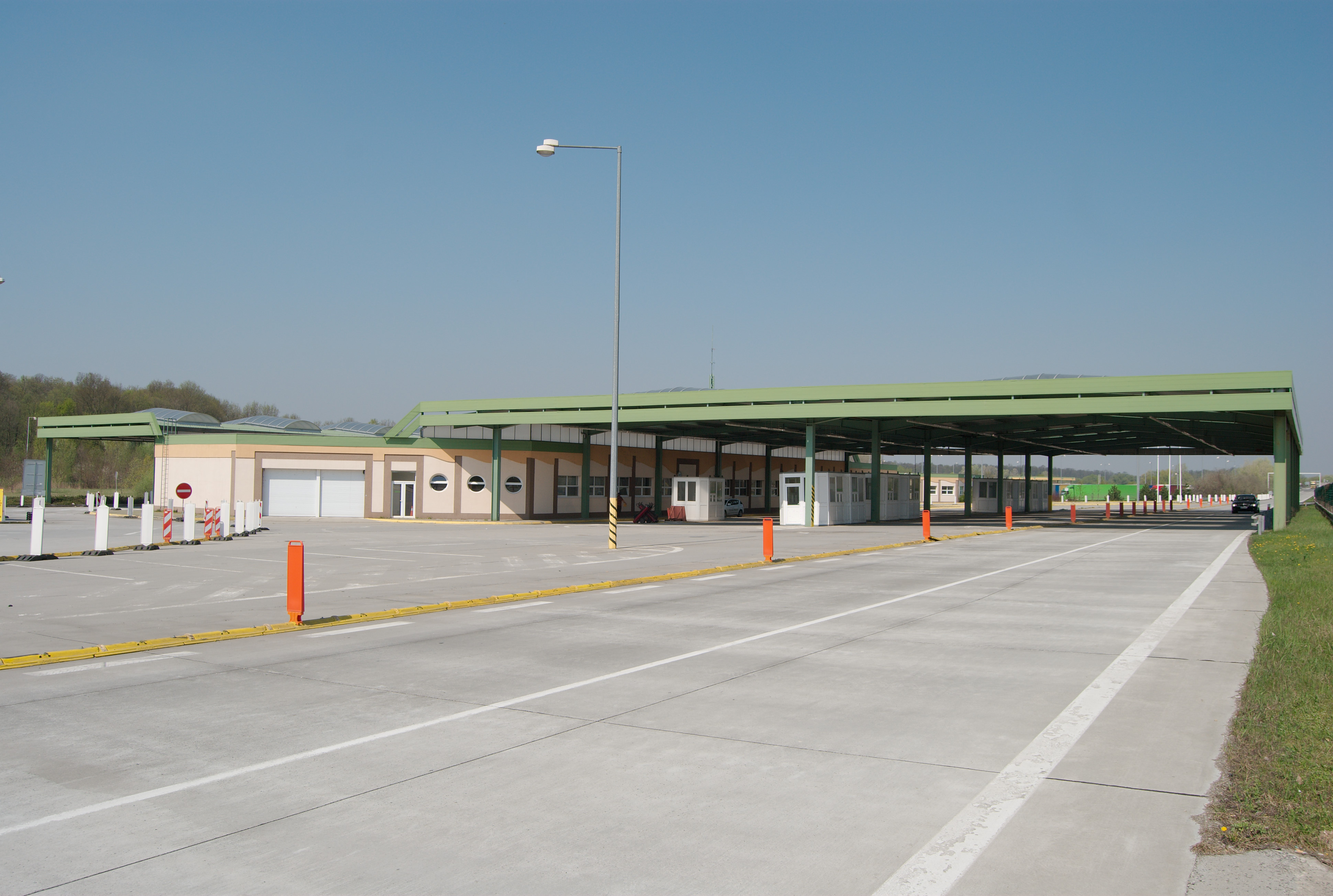 Pohled od jihu na již nefunkční slovenskou celnici na česko-slovenském dálničním hraničním přechodě Lanžhot - Kúty.